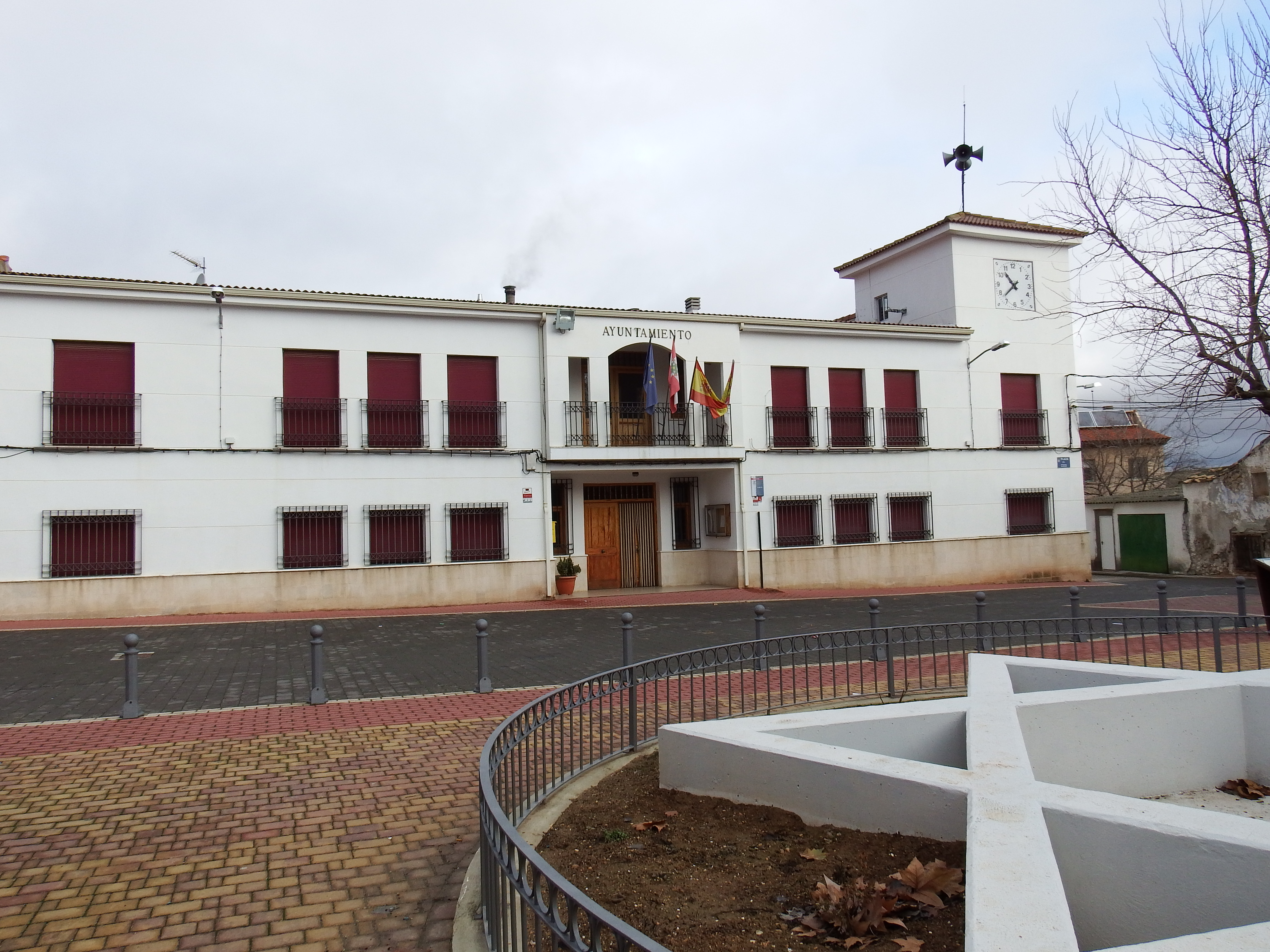 Ayuntamiento de Palomares del Campo